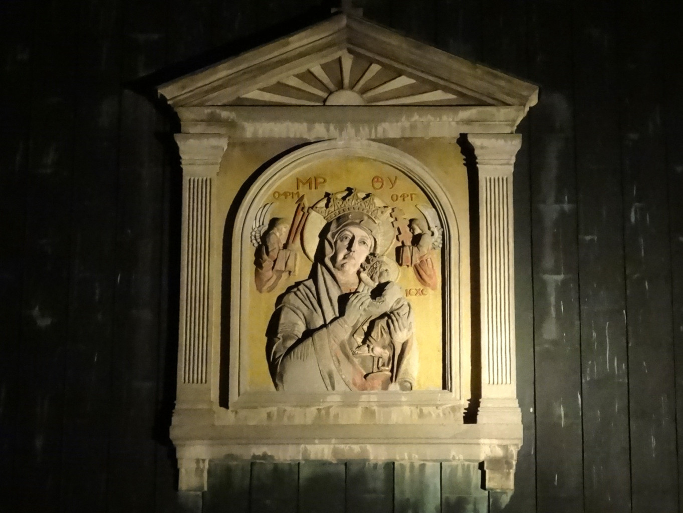 Kościół Matki Boskiej Nieustającej Pomocy w Bydgoszczy na os. Szwederowo, zbud. 1928 r.; na zdj. płaskorzeźba MB